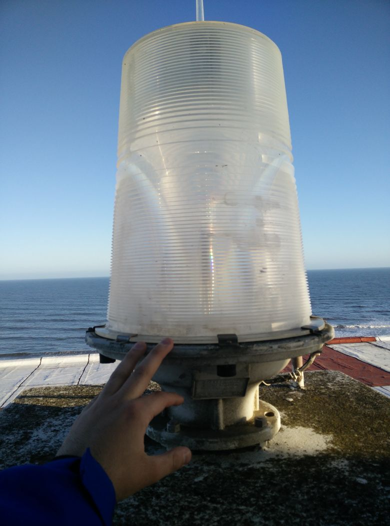 Baliza en el techo de un hotel en Miramar